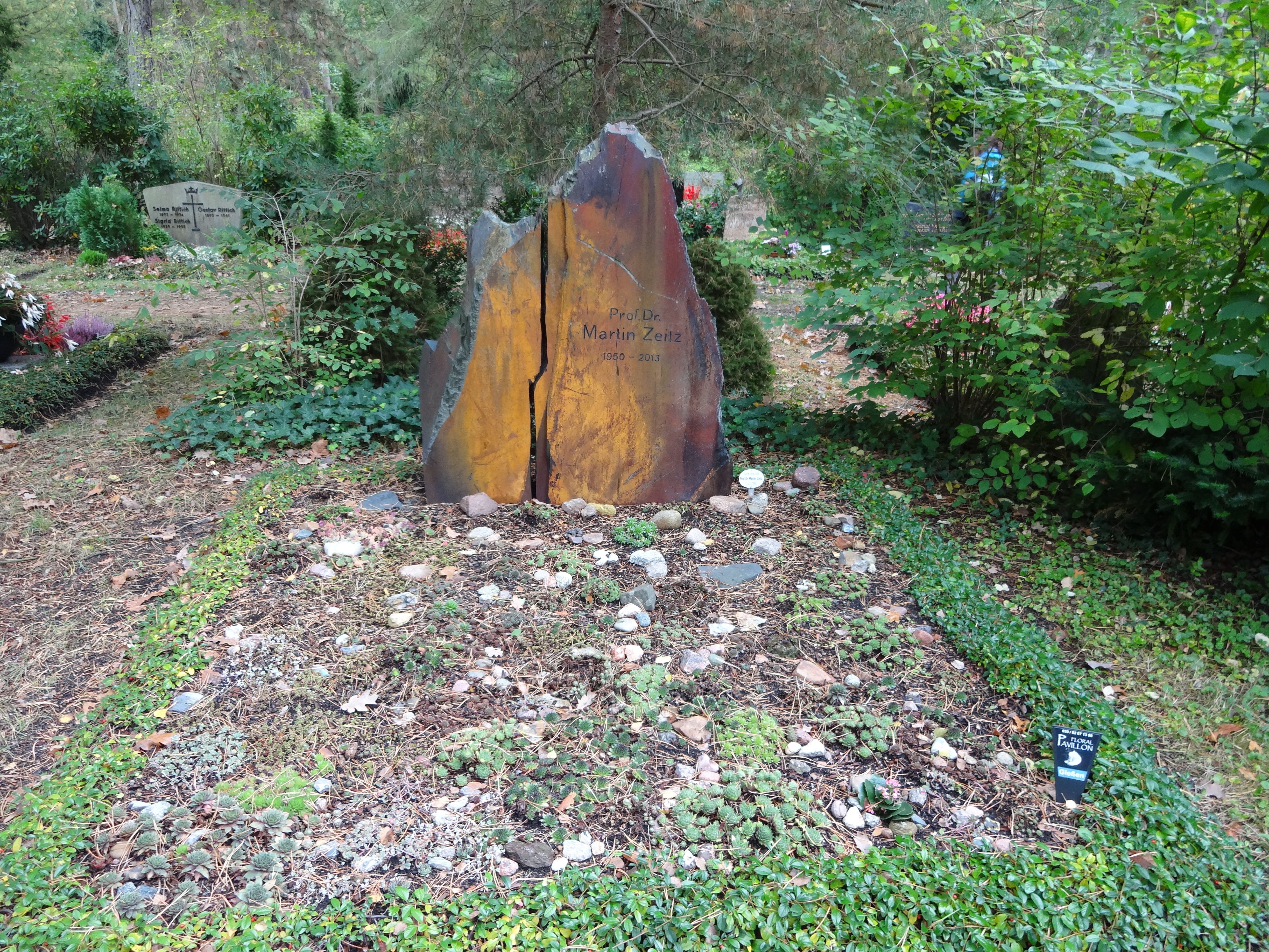 Grab von Prof. Martin Zeitz auf dem Waldfriedhof Zehlendorf